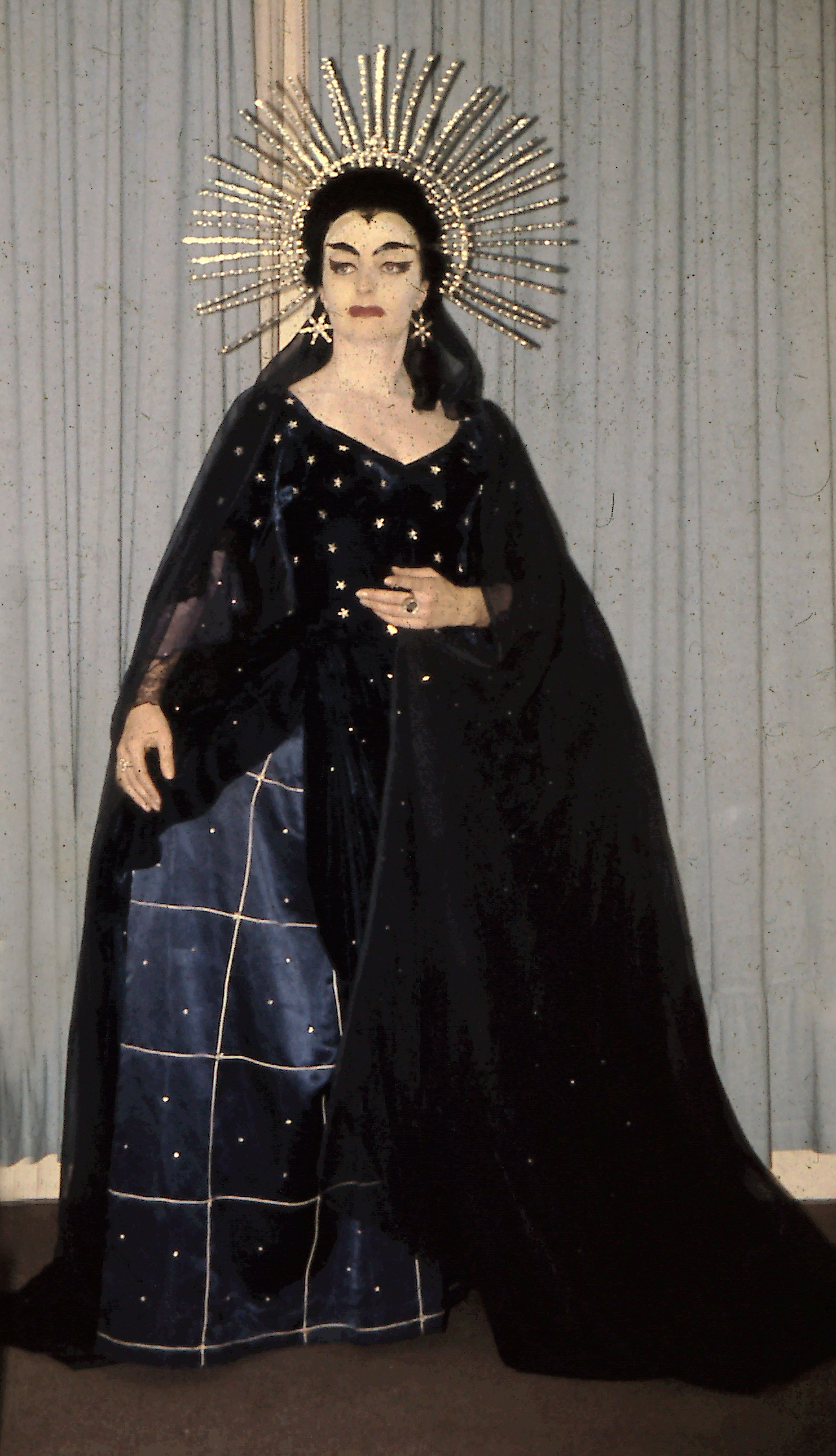 I kostumet som Nattens Dronning på Det Kgl. Teater